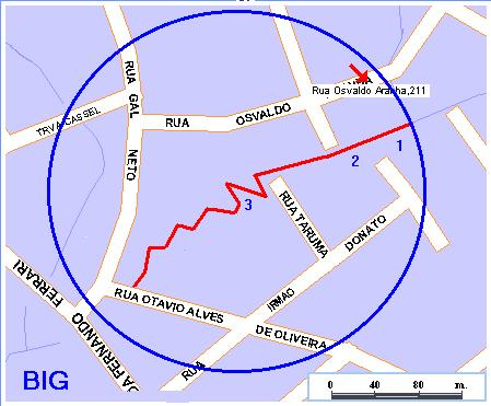 Visão em detalhes do sitio paleontológico cancela